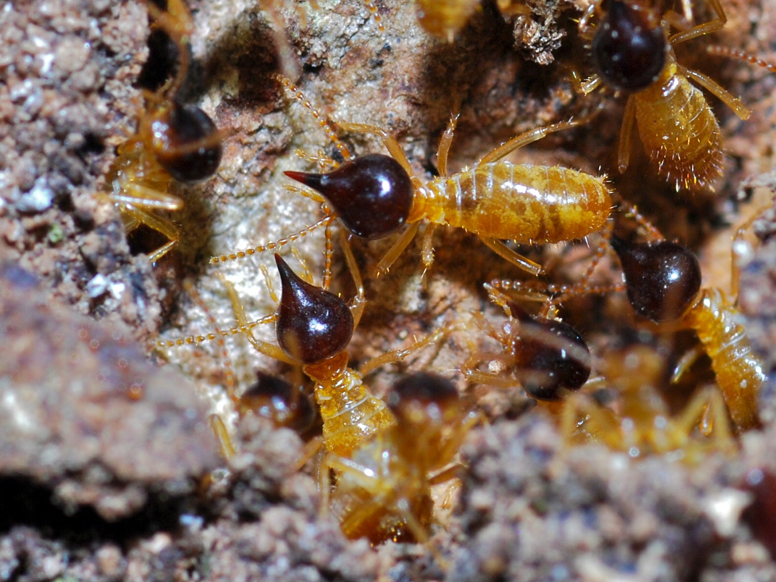 Tikal, GUATEMALA